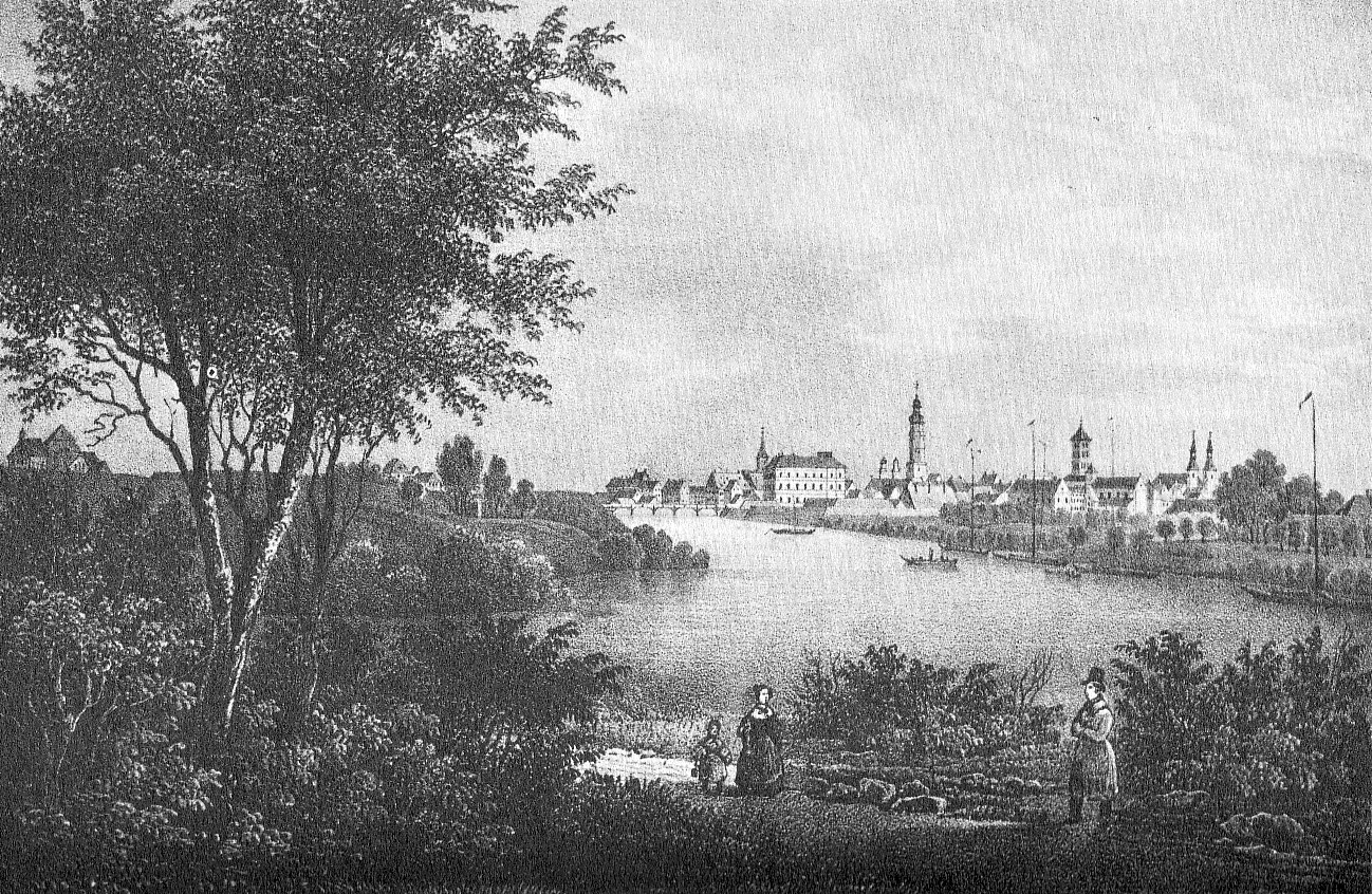 Historische Ansicht von Glogau in Schlesien (heute Glogów in Polen). Stahlstich.